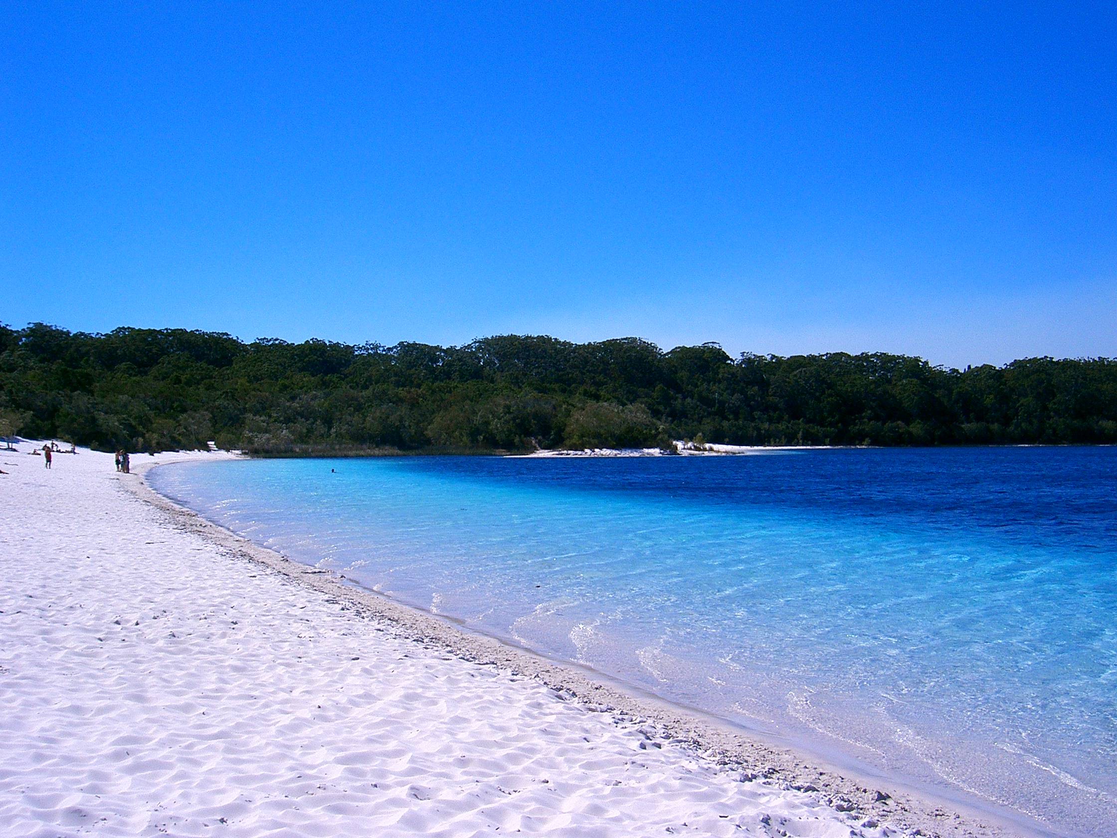 Lake McKenzie Beach, Fraser Island, Queensland, Australia